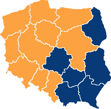 Carte du second tour de la présidentielle polonaise de 2020 - Candidat en tête par voïvodie